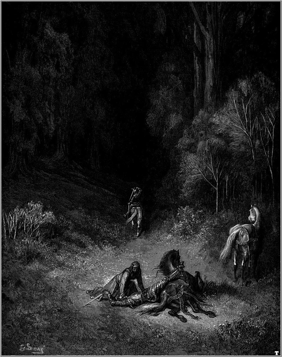 illustration of Ludovico Ariosto’s “Orlando Furioso”.